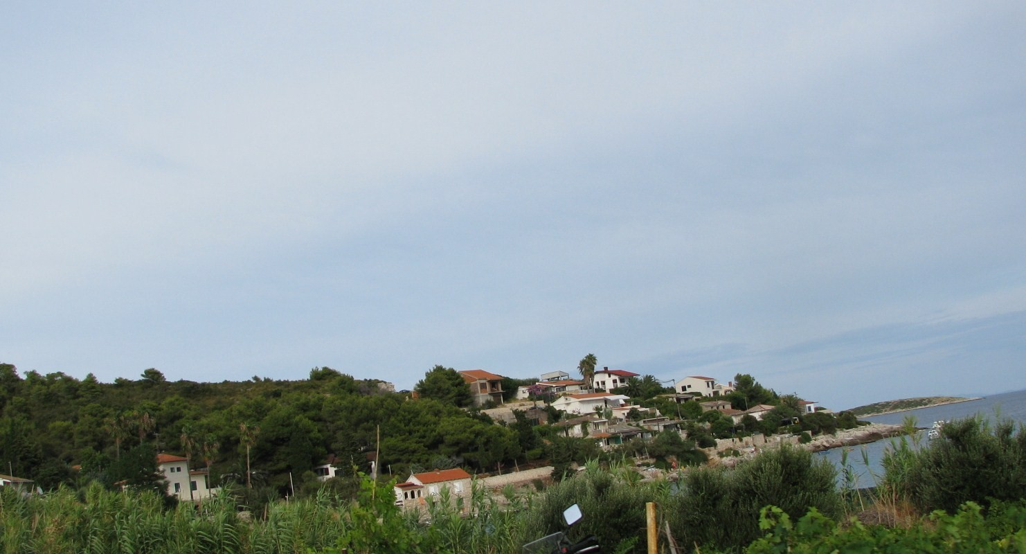 Naselje Milna na otoku Visu